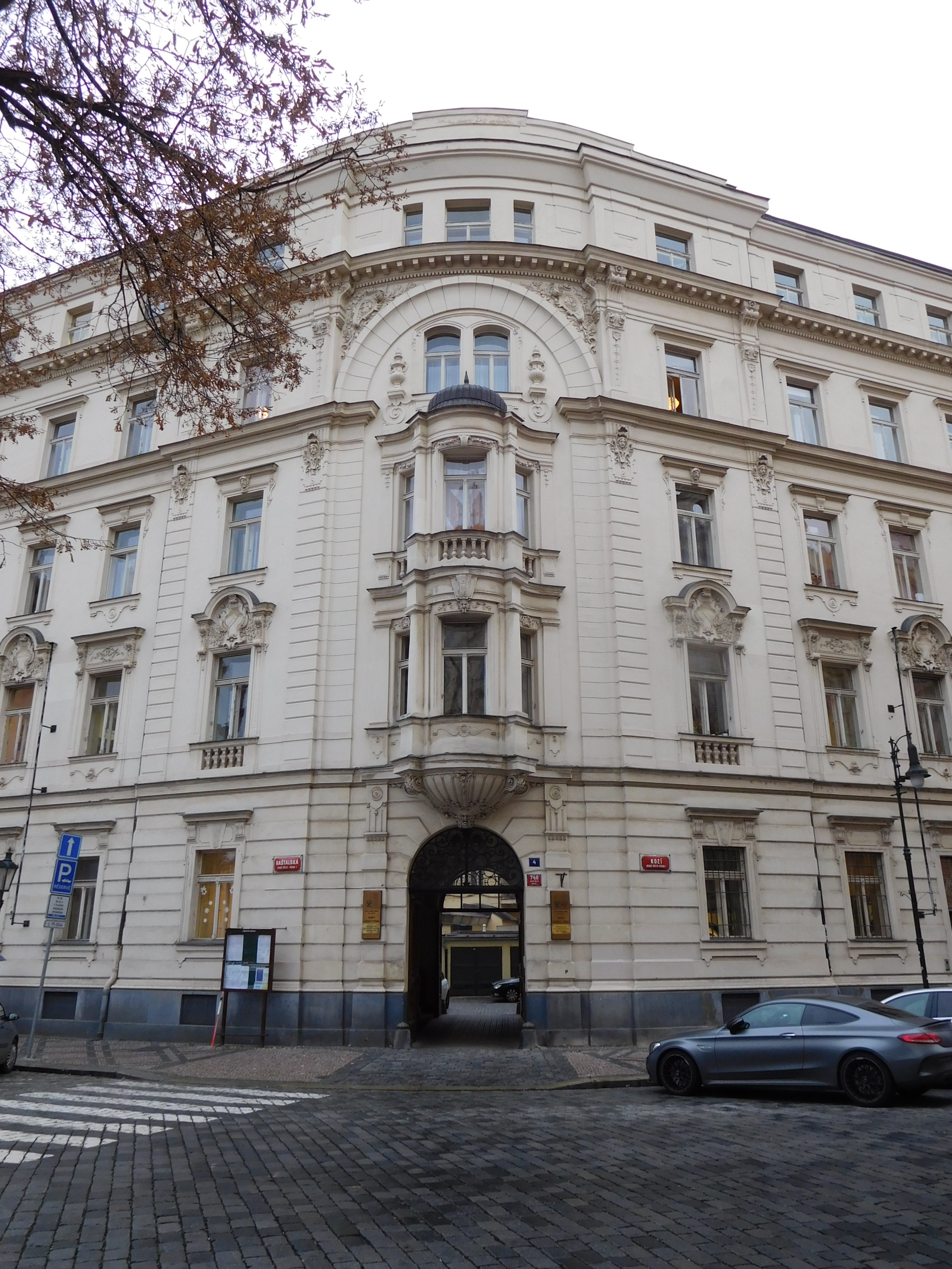 Praha - Staré Město, Kozí 4 - budova Báňského a Puncovního úřadu